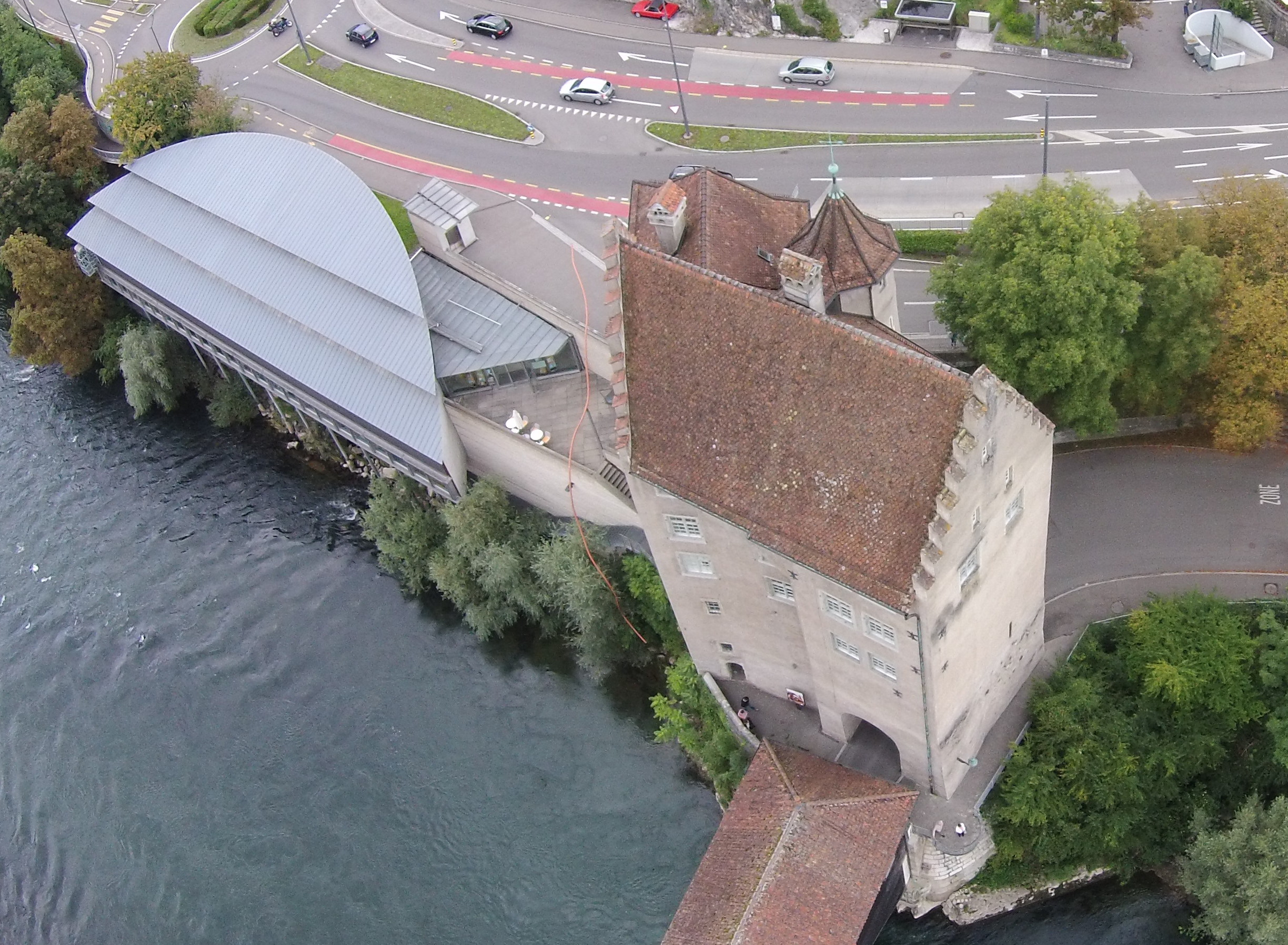 Landvogteischloss und historisches Museum, Baden AG